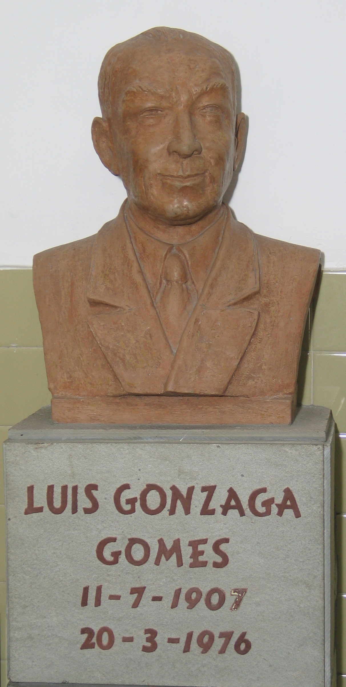 Statue of Luís Gonzaga Gomes, located in Escola Secundária Luso-Chinesa de Luís Gonzaga Gomes, Macao Source: taken by Glio